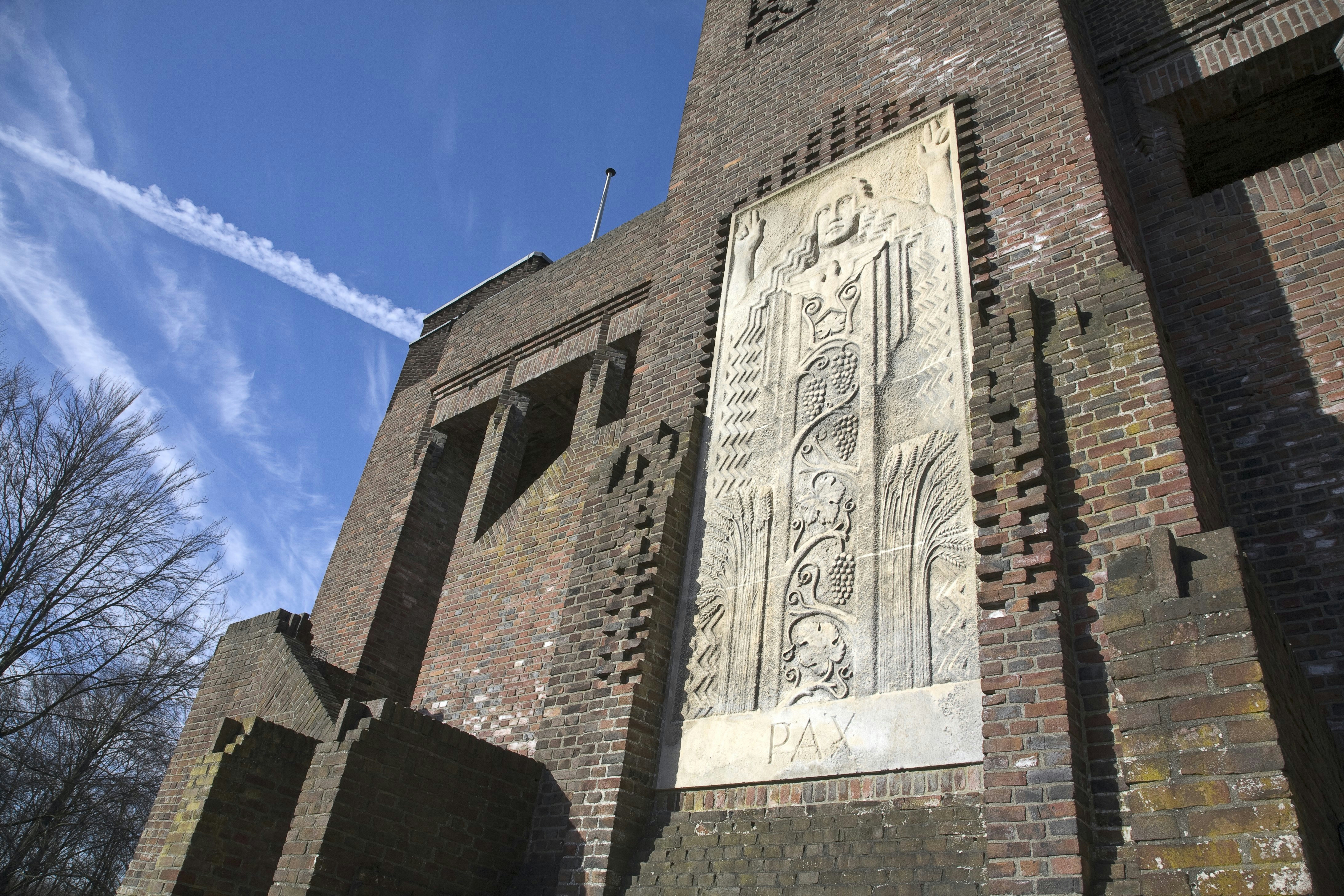 Belgenmonument: Detail van de voorzijde van het Belgenmonument (opmerking: Gefotografeerd voor Wegh der Weegen, ontwikkeling van de Amersfoortseweg 1647-2010)